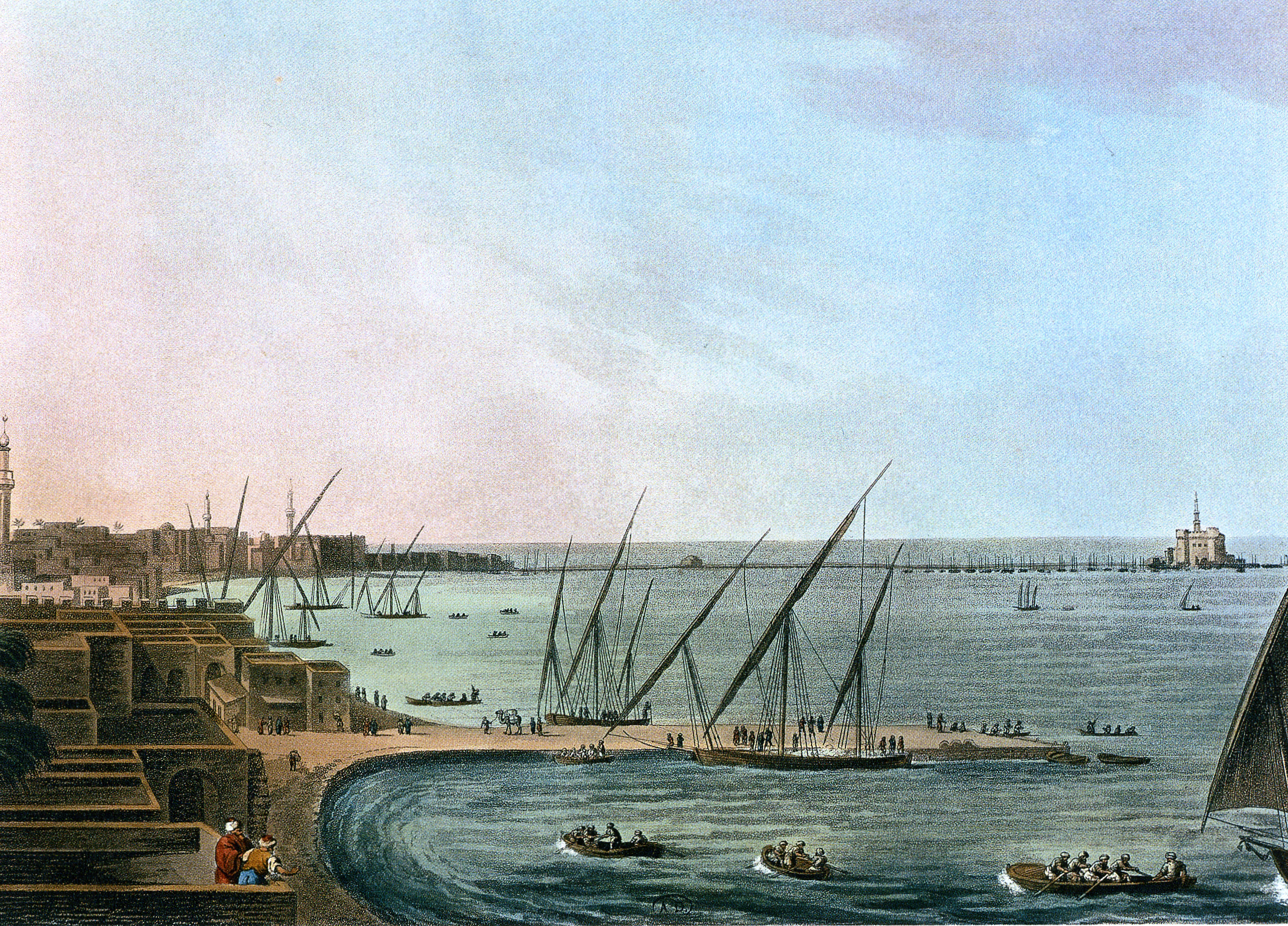 La ville d'Alexandrie et le phare.